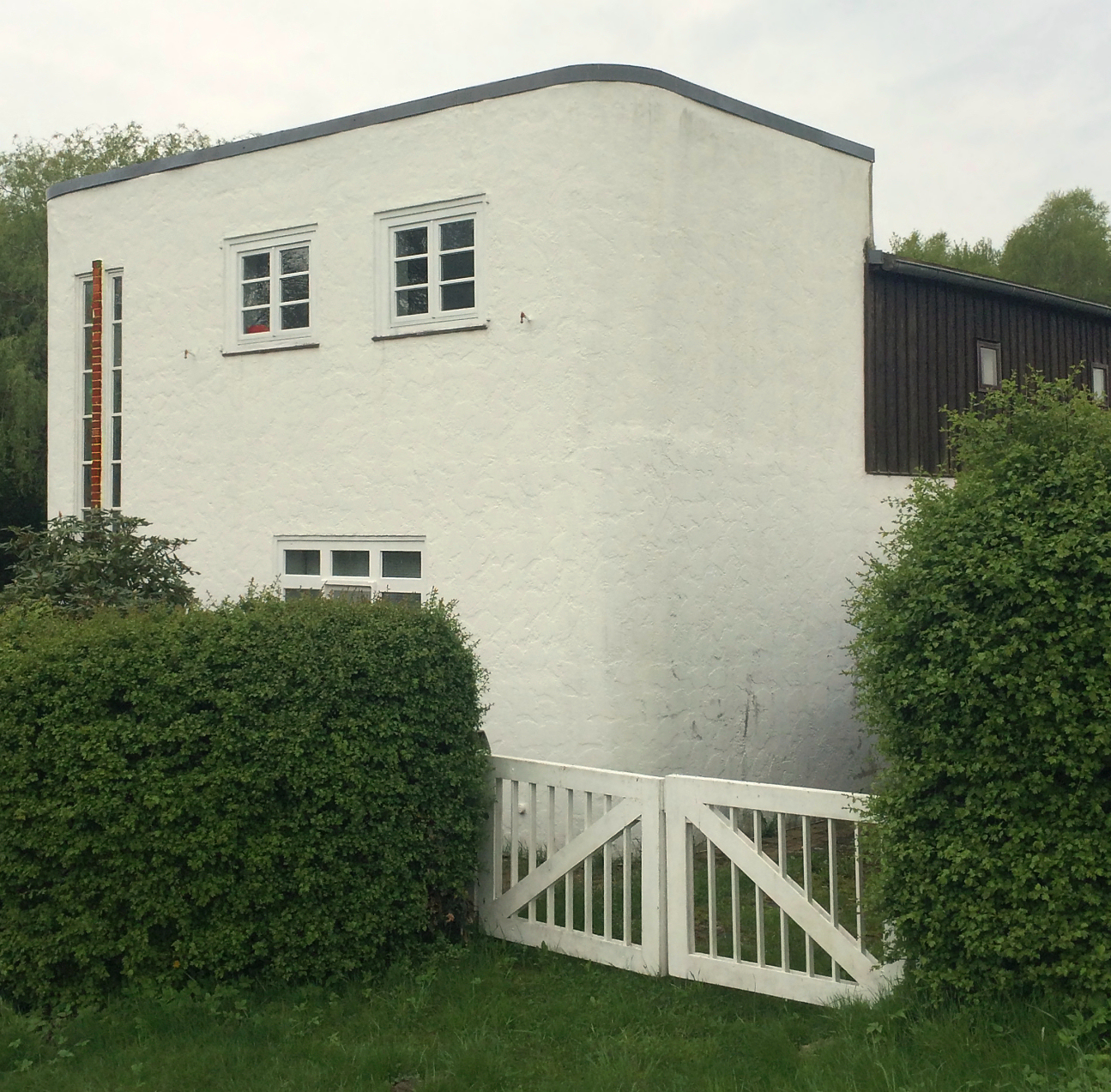 Ehemalige Ziegenbockstation bei Osterholz-Scharmbeck